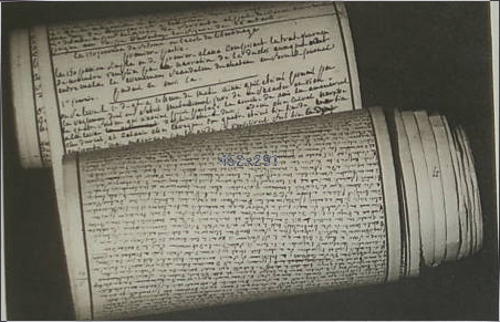 Manuscrit original des 120 journées de Sodome de Sade (Rouleau de 12 mètres de long sur 11 centimètres de large retrouvé à la Bastille.